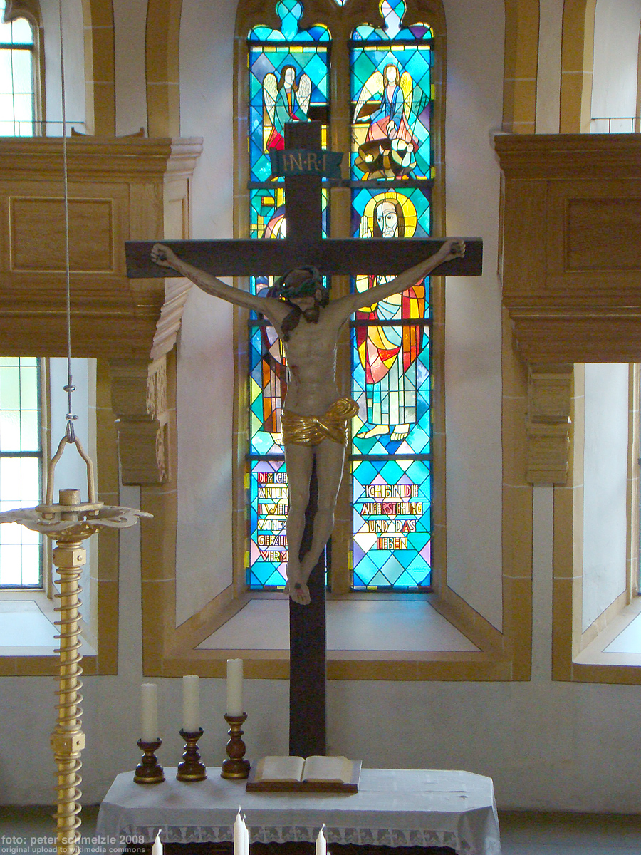 Altarkruzifix der Stadtkirche St. Salvator in Neckarbischofsheim